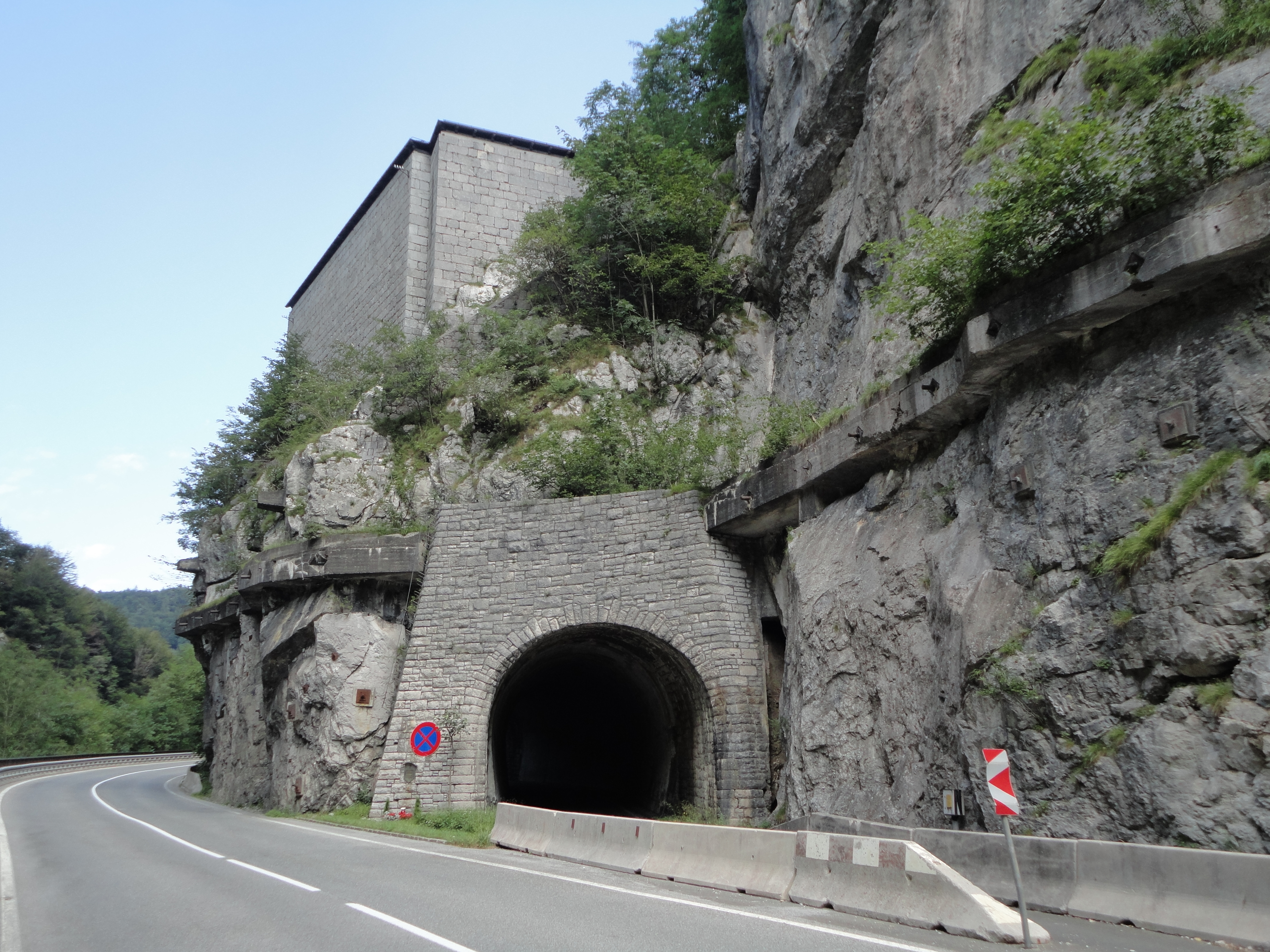 Paßanlage und -befestigung